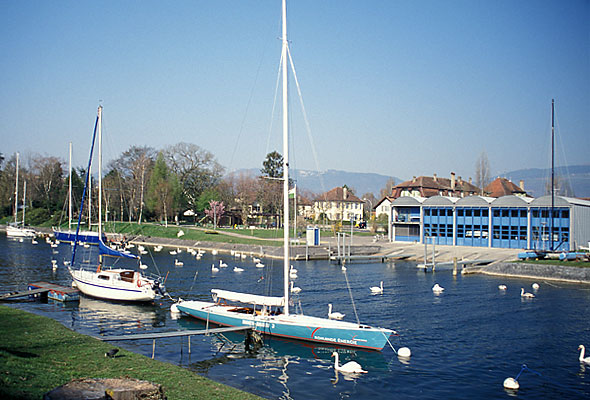 Die kanalisierte Thielle bei Yverdon, im Hintergrund die Höhen des Juras